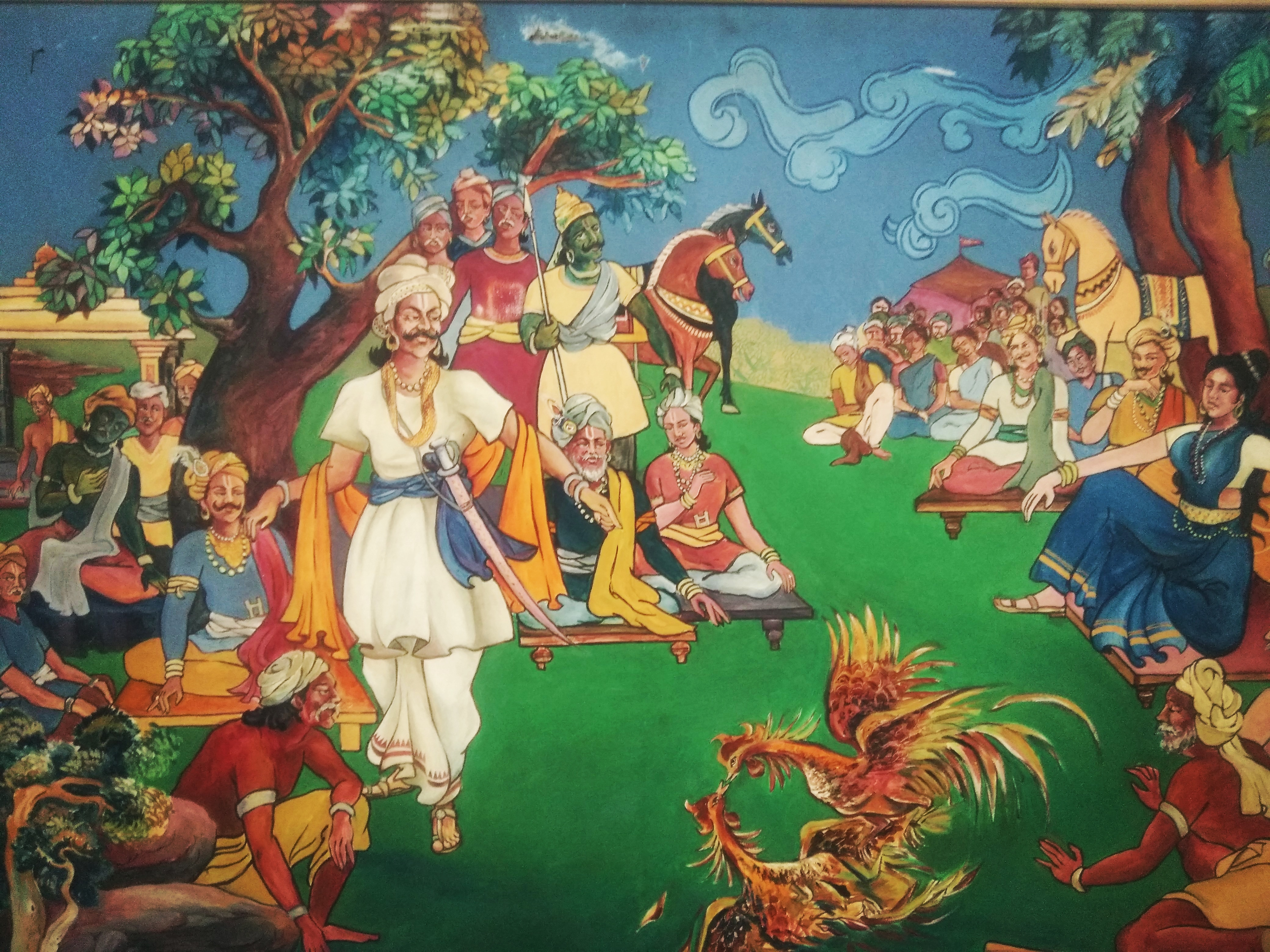 Nagamma painting: Minister of king Nalagama invited the king of Macherla and his minister Brahma Nayudu to Gurajala and indused them to let in Cock fights.Treacherously she won the bet and sent the macherla camp into the woods .Seed was sown for the battle of Palnad. Artist:K.Sheshagiri Rao. నాగమ్మ: మాచర్లకు అధిపతి అయిన మలిదేవరాజునీ మరియు మంత్రి బ్రహ్మనాయుడును తమ రాజధాని గురజాలకు రప్పించి ,కోడిపందాలను ఆడించింది.నలగామరాజు మంత్రిని నాగమ్మ మెూసంతో పందెం గెలిచి మాచర్ల వారిని సపరివారంగా అడవుల పాలు చేసింది.ఈ సంఘటనే పల్నాటి యుద్ధానికి అంకురారోపణ. చిత్రకారుడు: కె.కేశగిరిరావు